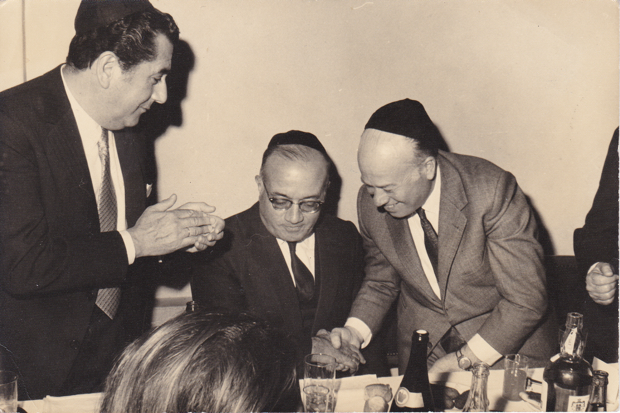 El Jajam Isaac Chehebar (centro) junto a Don Shaul Sutton (derecha)